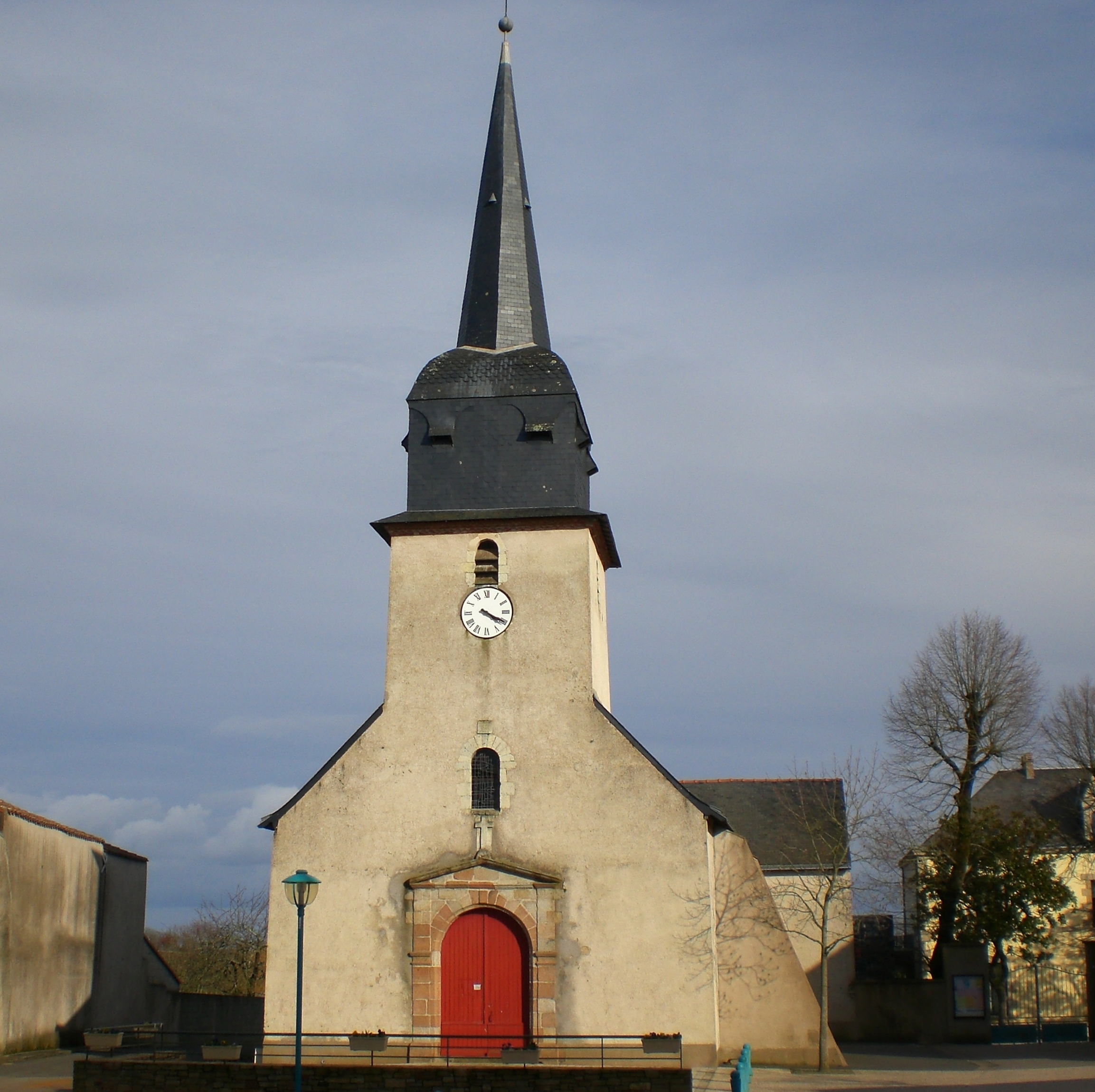 Église Saint-Francois-de-Sales, 1825, La Regrippière.